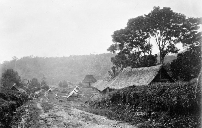 Foto. Deze foto is gemaakt tijdens de Sumatra Expeditie van 1877-1879. Landschappen uit de Padangsche Bovenlanden.. Pasar Lolo in de Padangse Bovenlanden, Westkust Sumatra